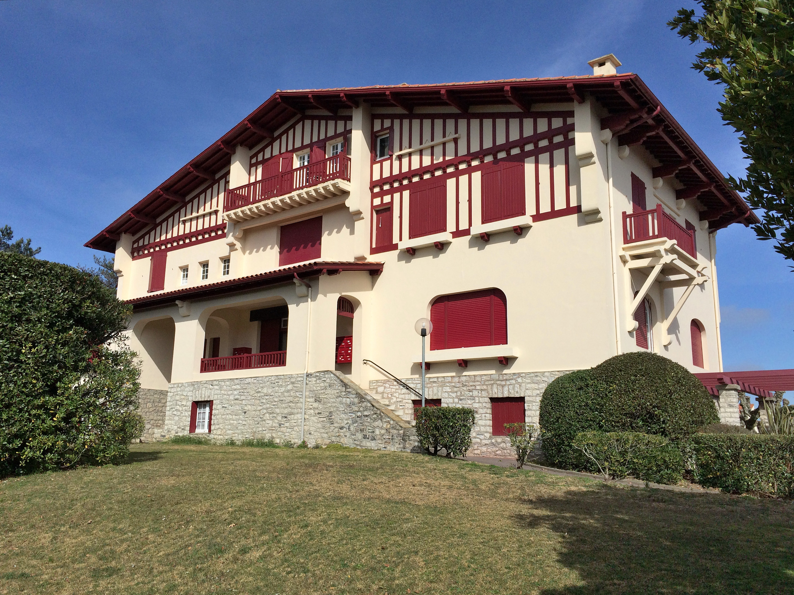 Villa Irintzina de l'architecte Henri Godbarge